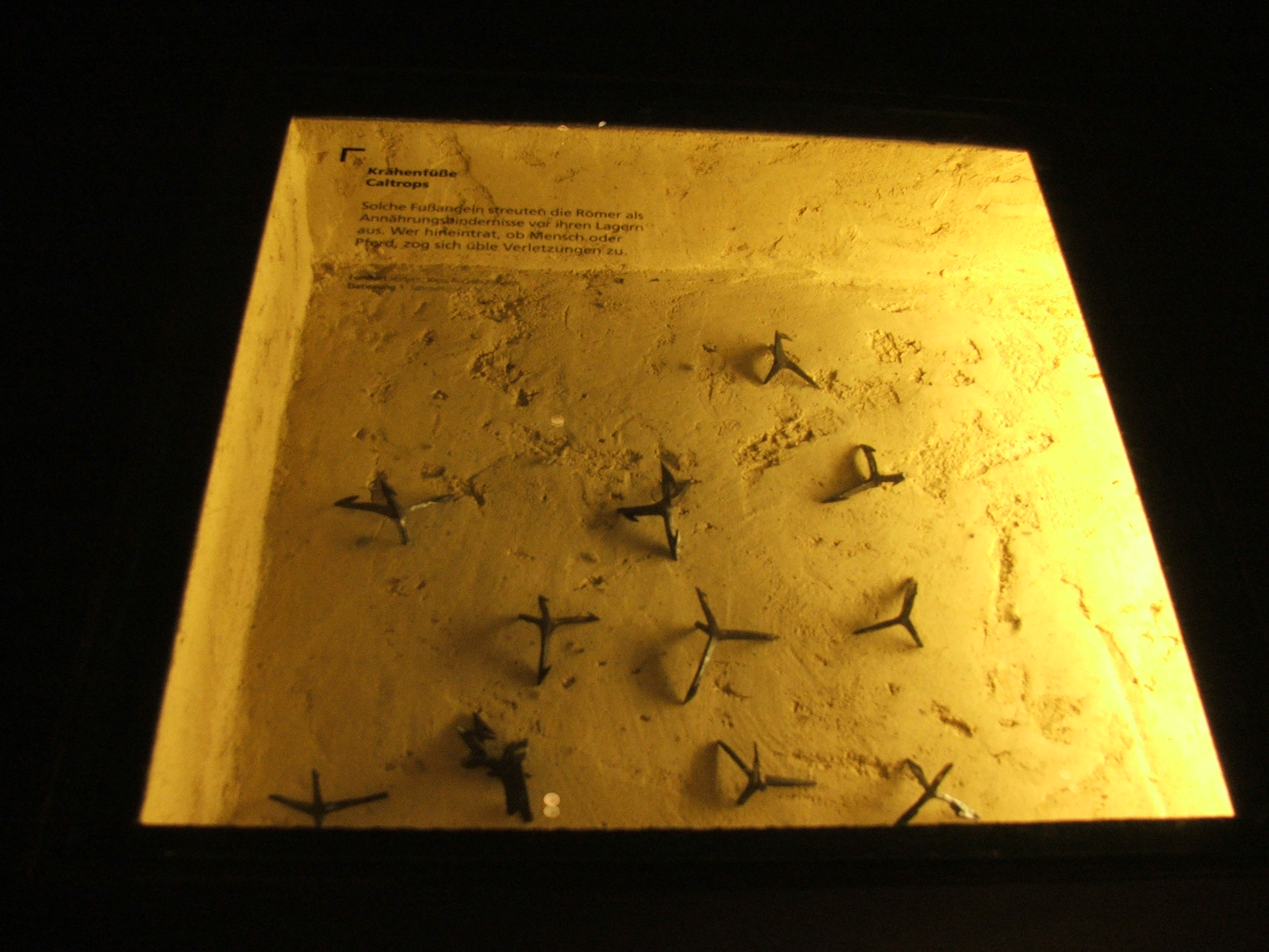 Römische Krähenfüsse, Roman Caltrops, Westfälisches Museum für Archäologie